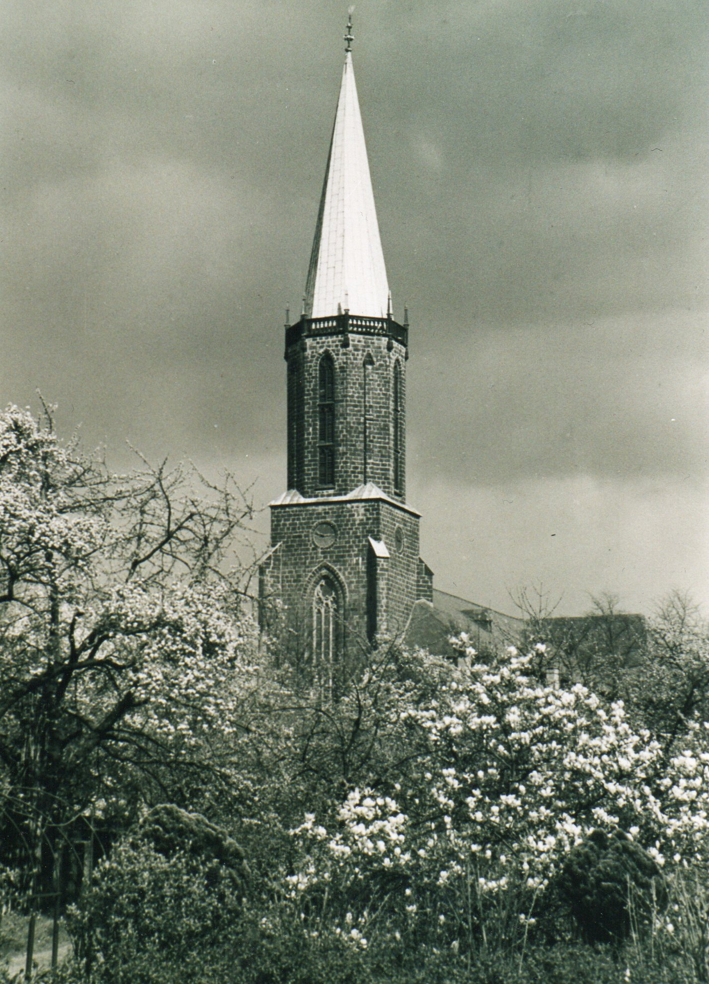 Die Große Kirche an der Märtmannstraße Anfang der 1960er Jahre.